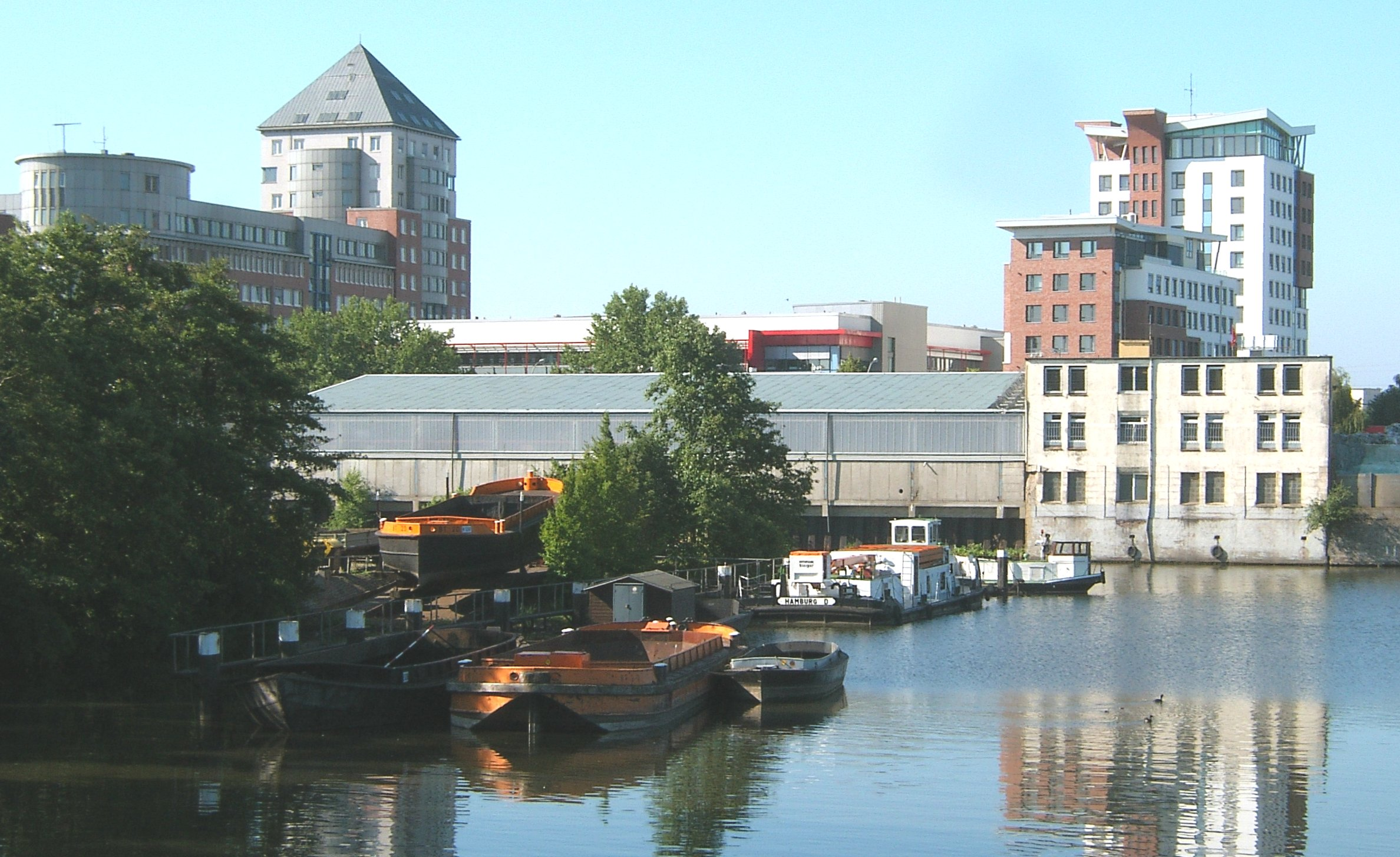 Bildbeschreibung: Hamburg, Rothenburgsort, Blick von Hammerbrook über die Bille.